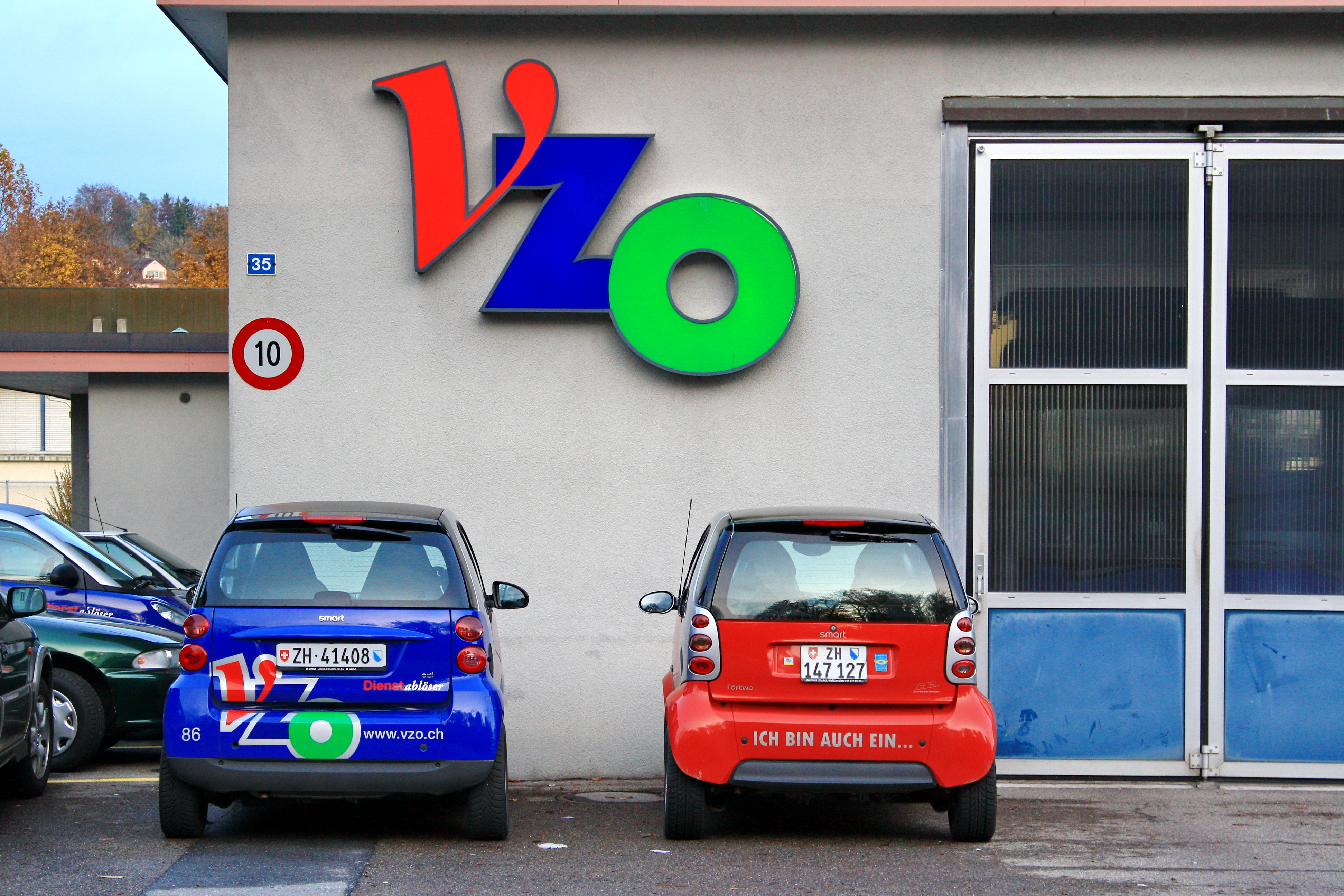 Verkehrsbetriebe Zürichsee und Oberland (VZO) depot at Werkstrasse in Rüti (ZH)